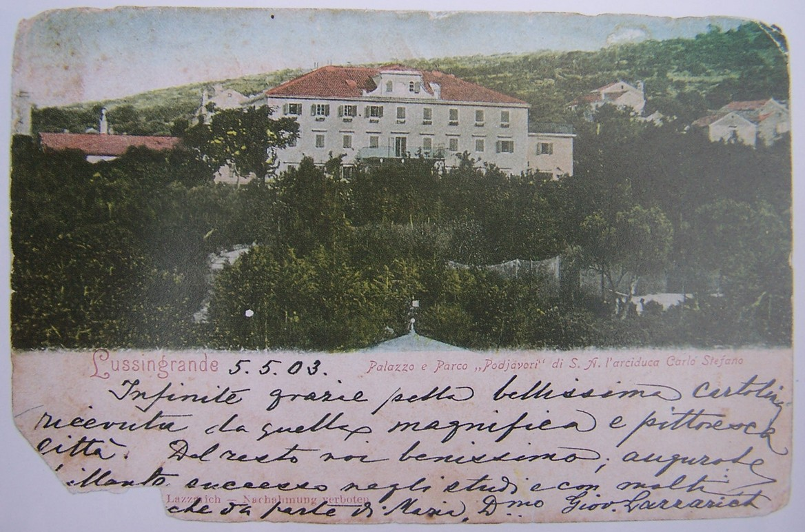 Veli Losinj Postkarte Winterresidenz und Park des Erzherzogs Karl Stephan 1903